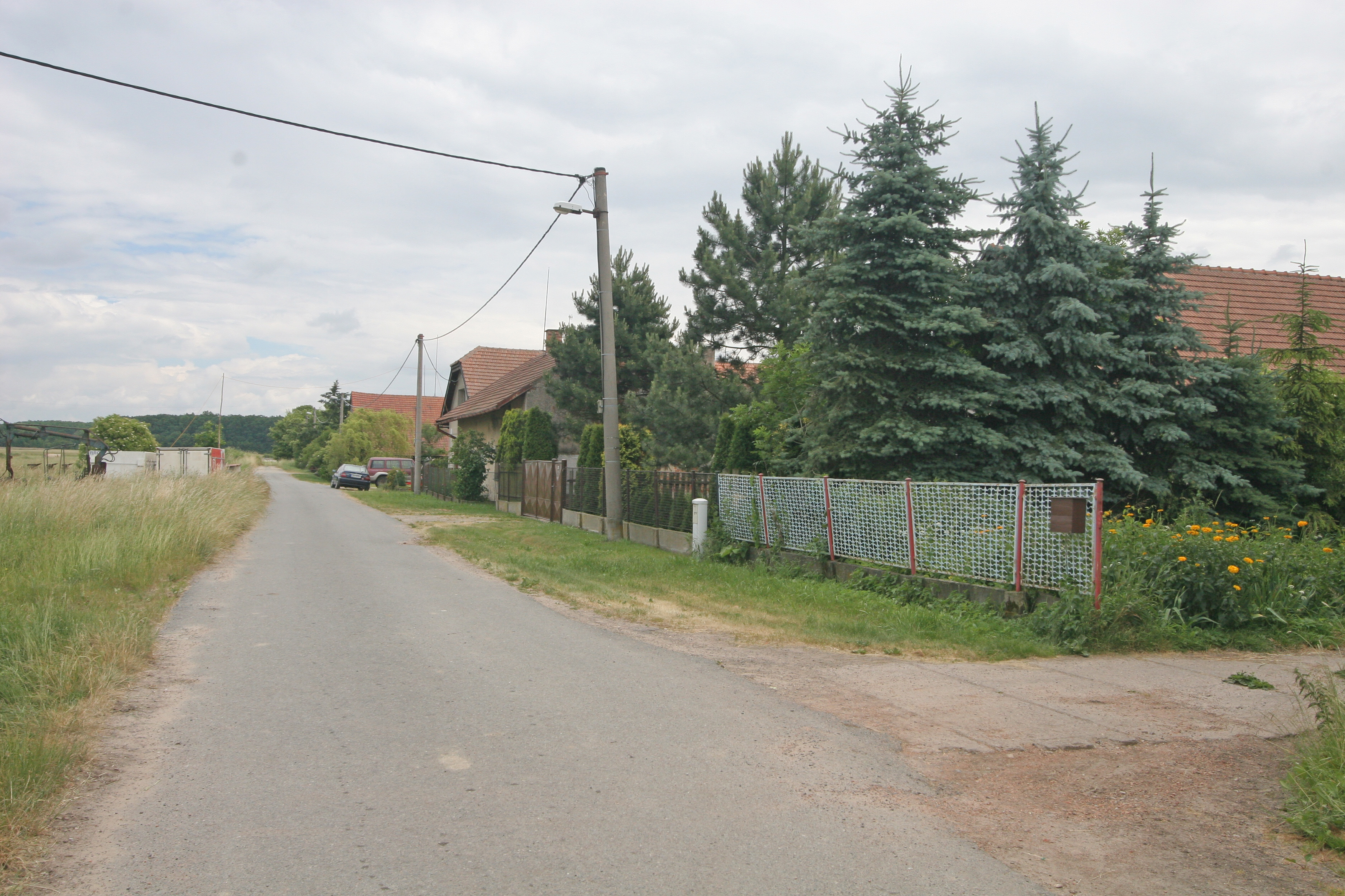 Drahoš čp. 9